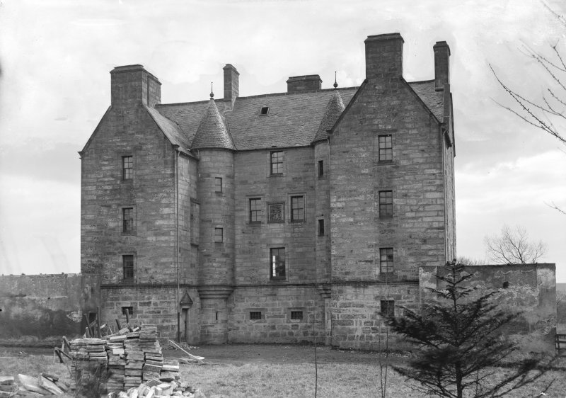 Pitreavie Castle vor 1885